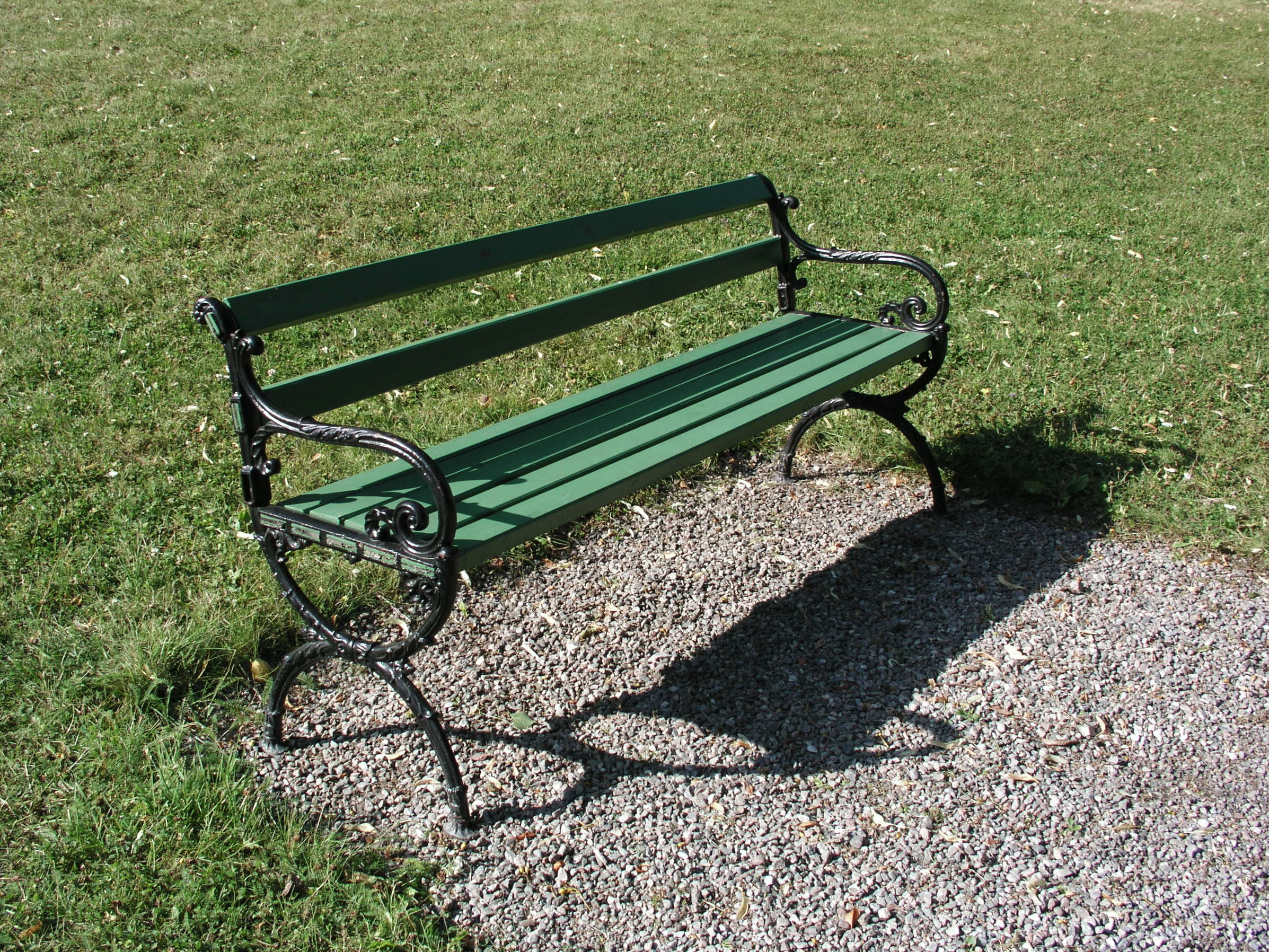 Garden bench — Tullgarns slott/palace garden, Södertälje kommun, Sweden.